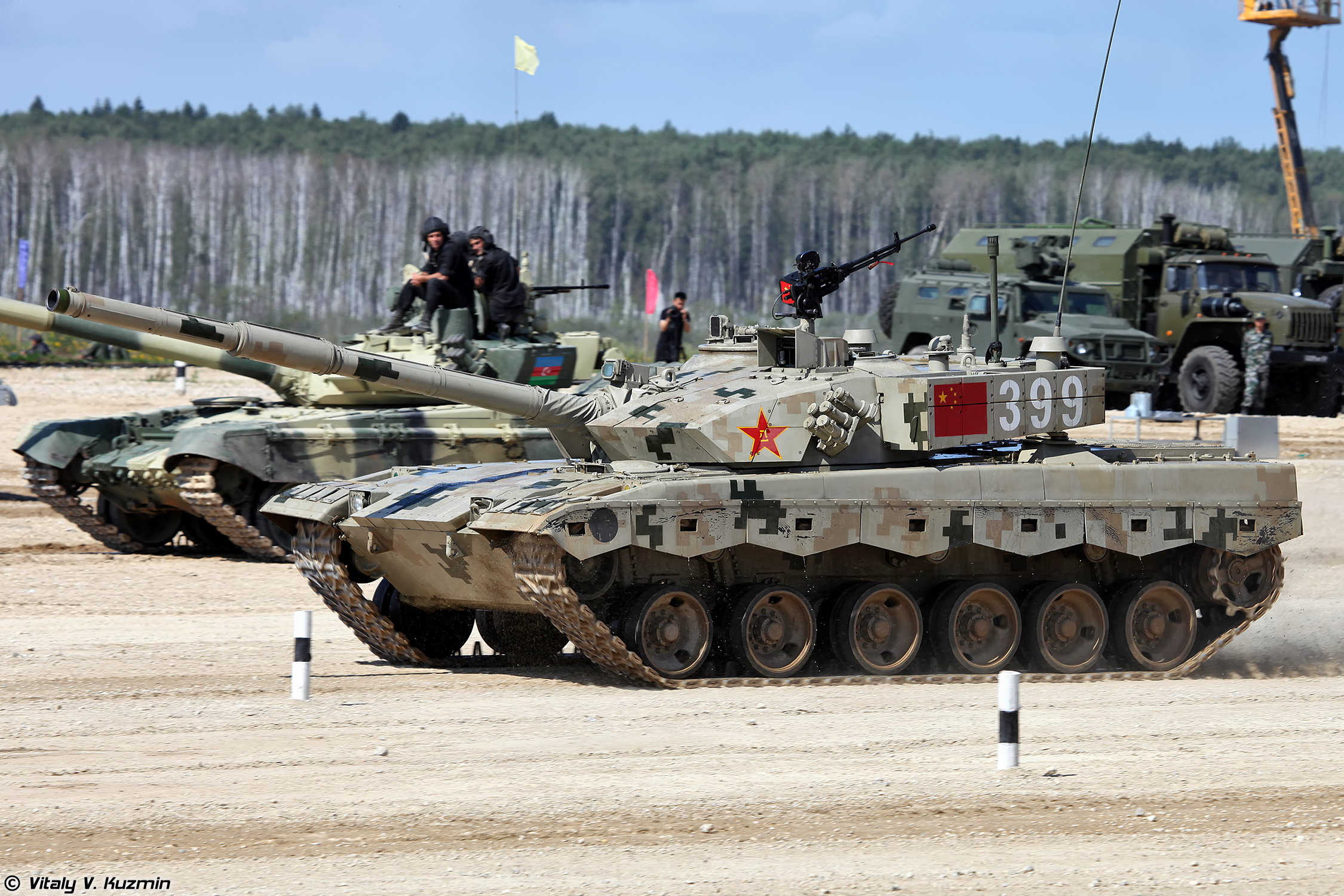 96B坦克参加俄罗斯"坦克两项-2017"比赛。